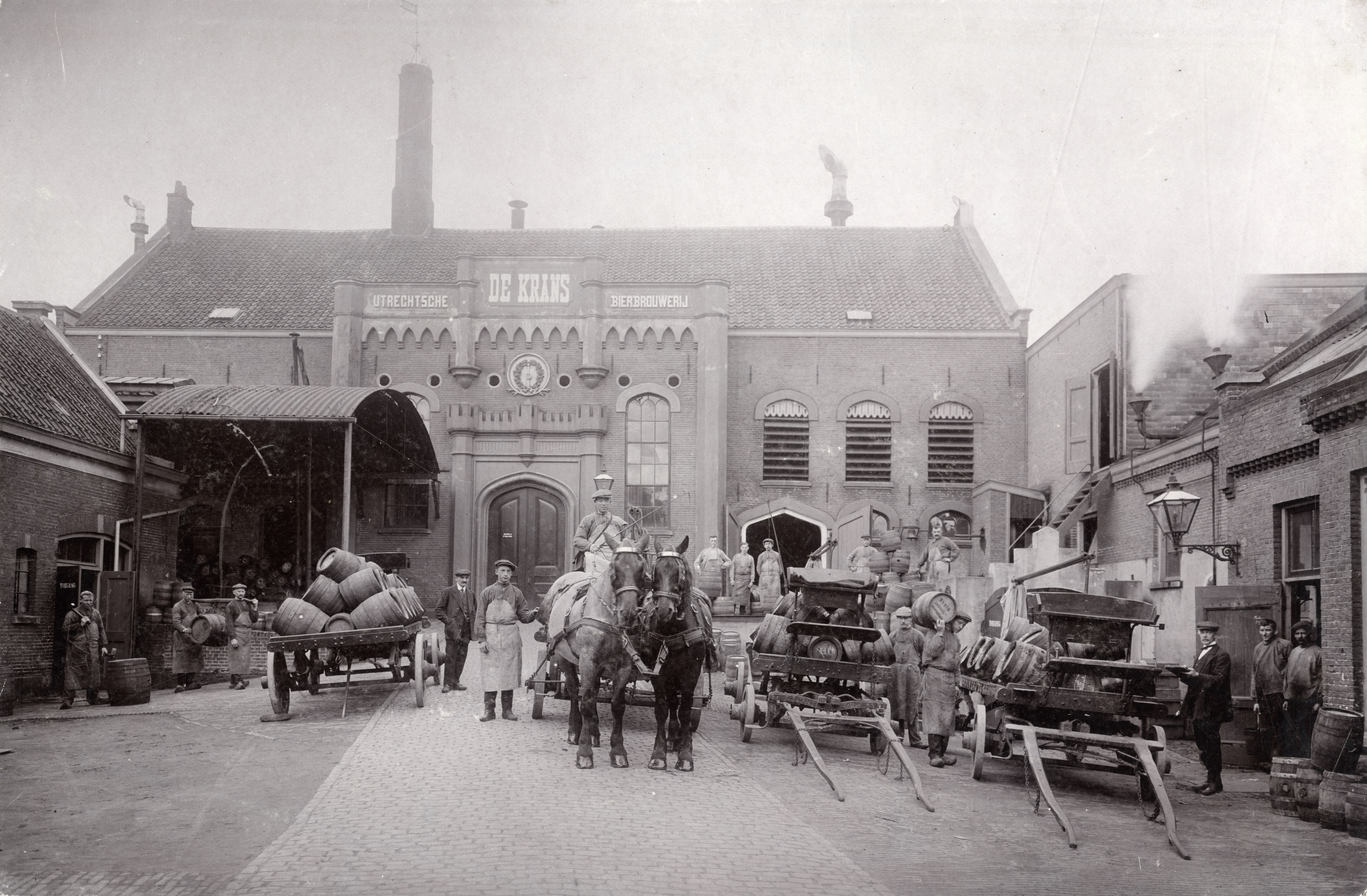 Brouwerij De Krans Croeselaan 1 Utrecht in 1910 foto G. Jochmann (Het Utrechts Archief fotonummer 55490)